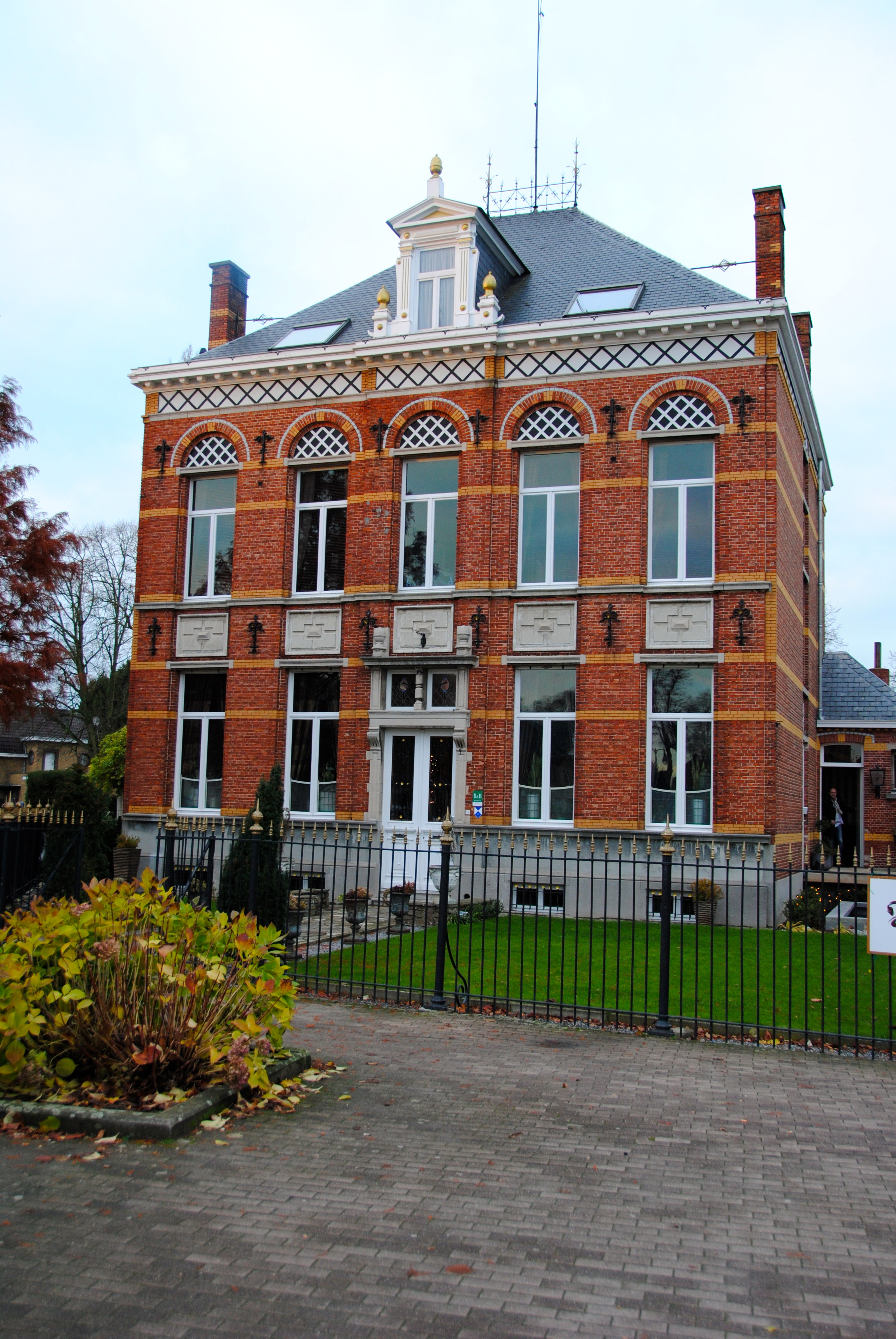 Markt 14, Vorst (Laakdal)